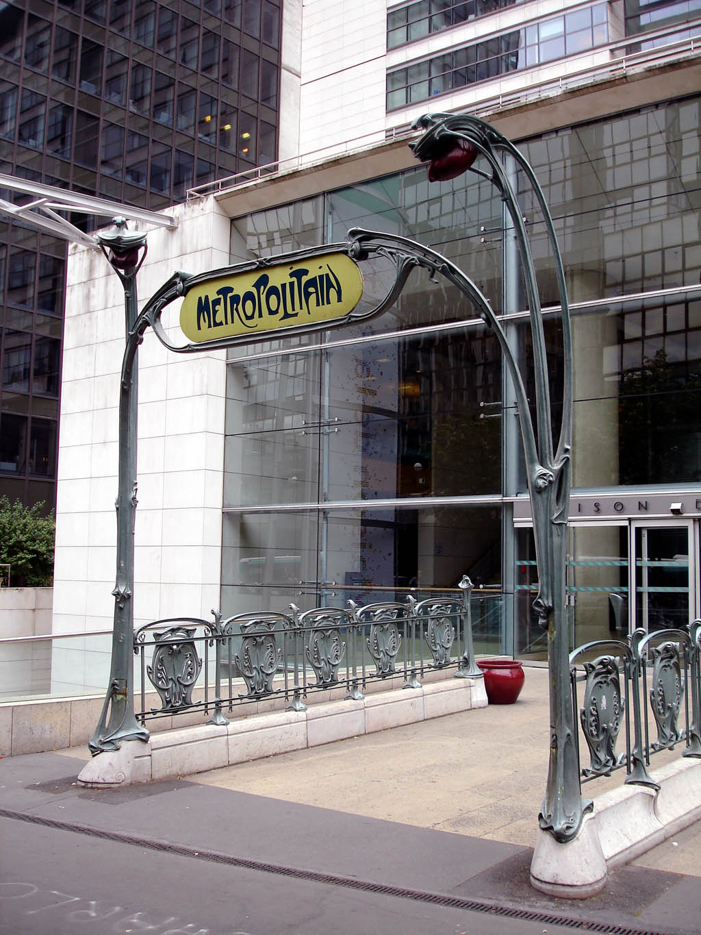 Maison de la RATP à Paris, France.